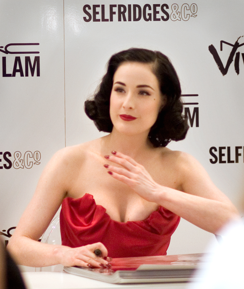 Dita Von Teese at Selfridges, London